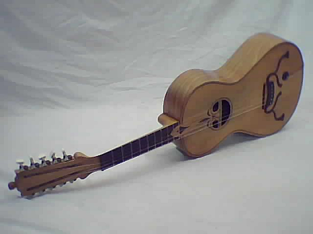 Fotografia de uma Viola braguesa